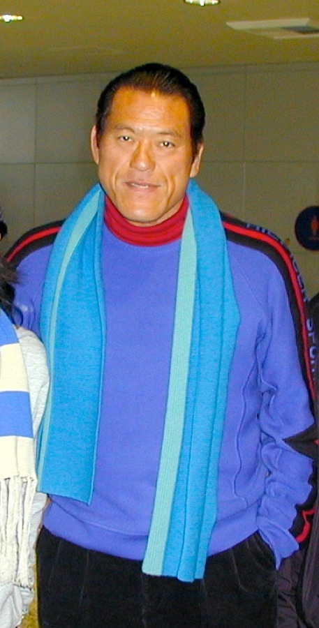 Antonio Inoki (アントニオ猪木)